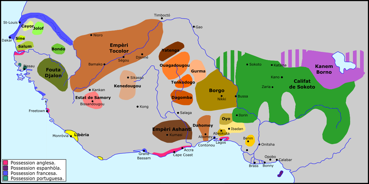 Africa de l'Oèst en 1875.